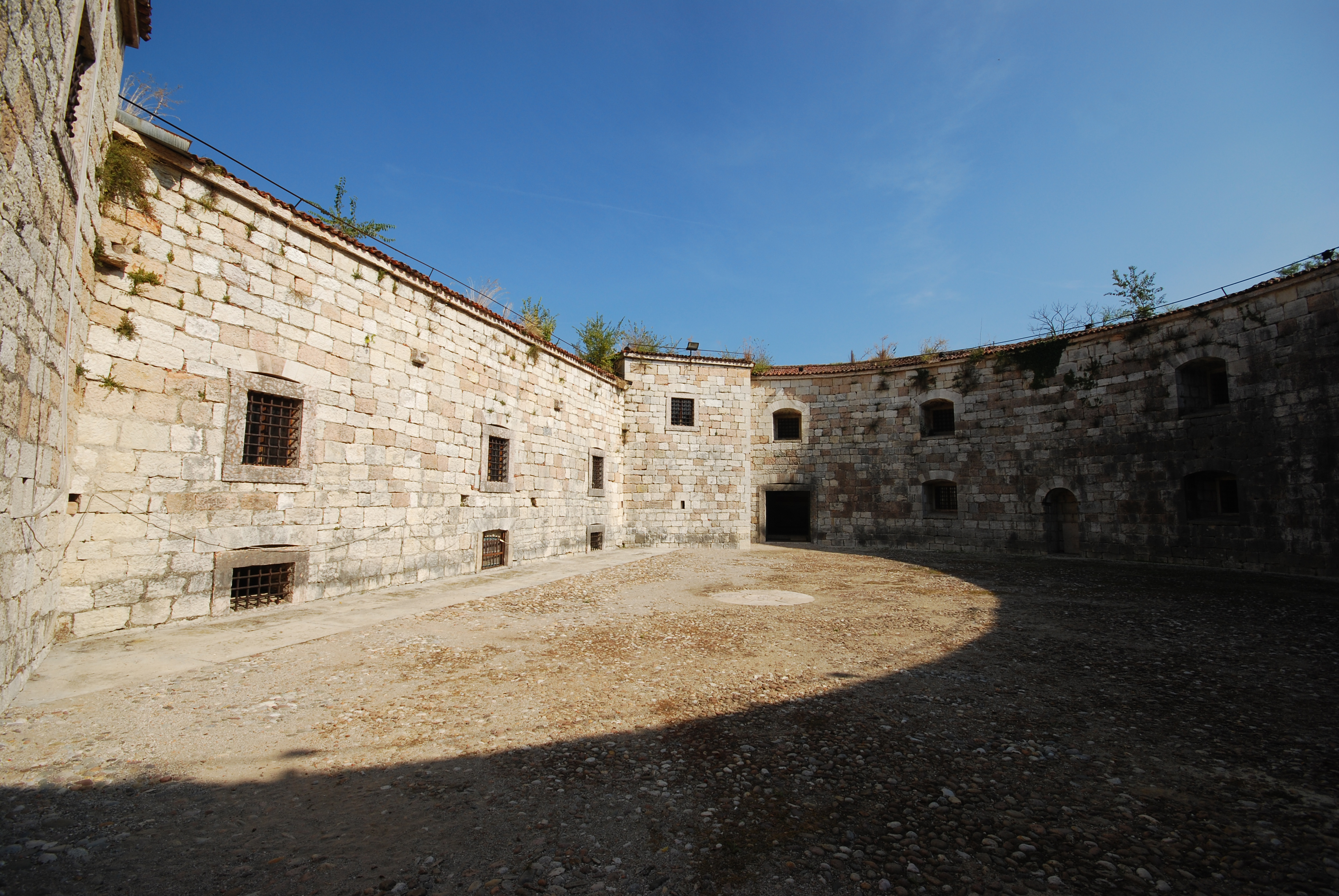 Forte Ardietti This is a photo of a monument which is part of cultural heritage of Italy.